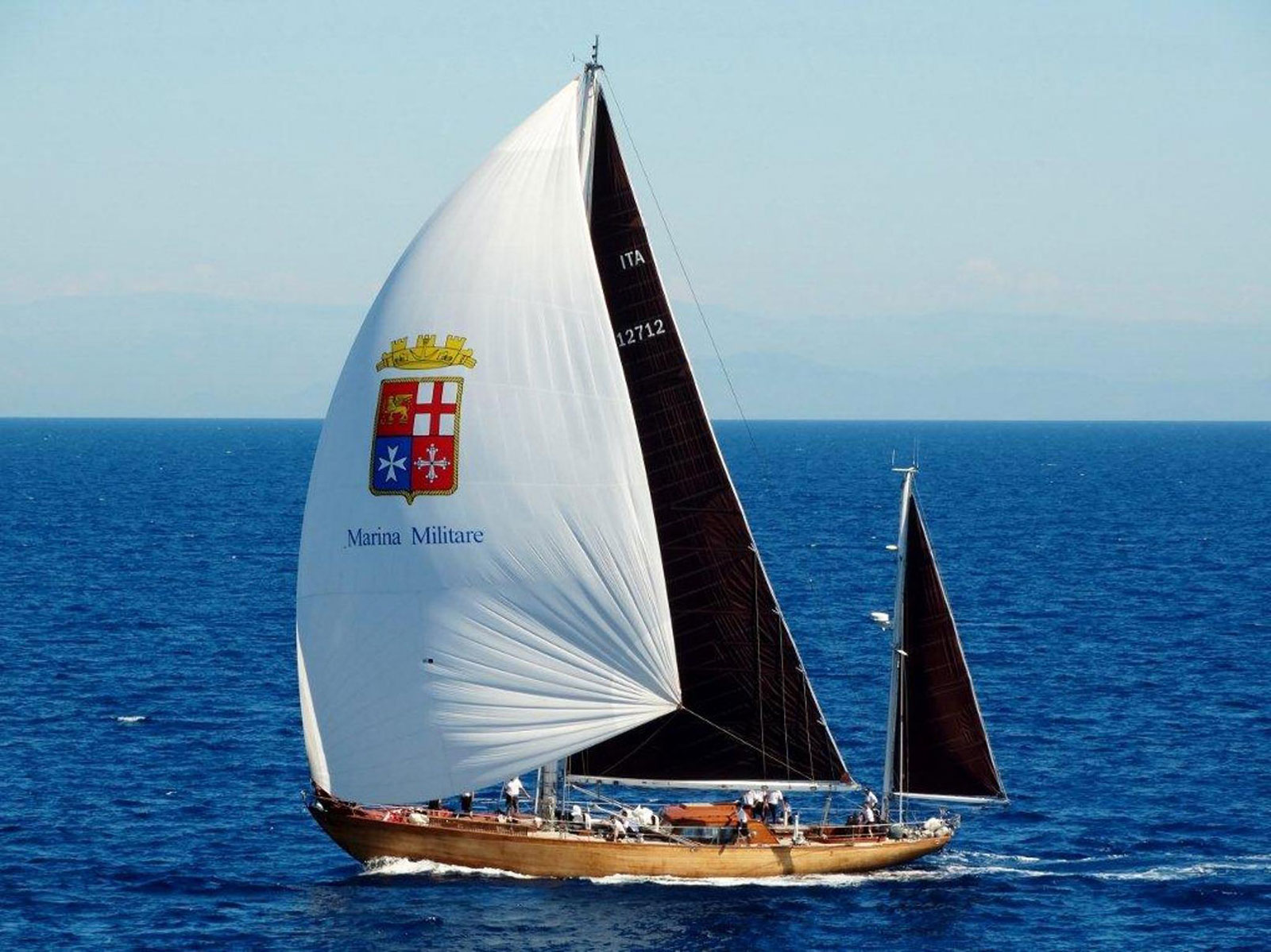 Navi Scuola a vela Capricia della MMI; la nave è di stanza nel porto di Livorno per la formazione degli allievi dell’Accademia Navale.